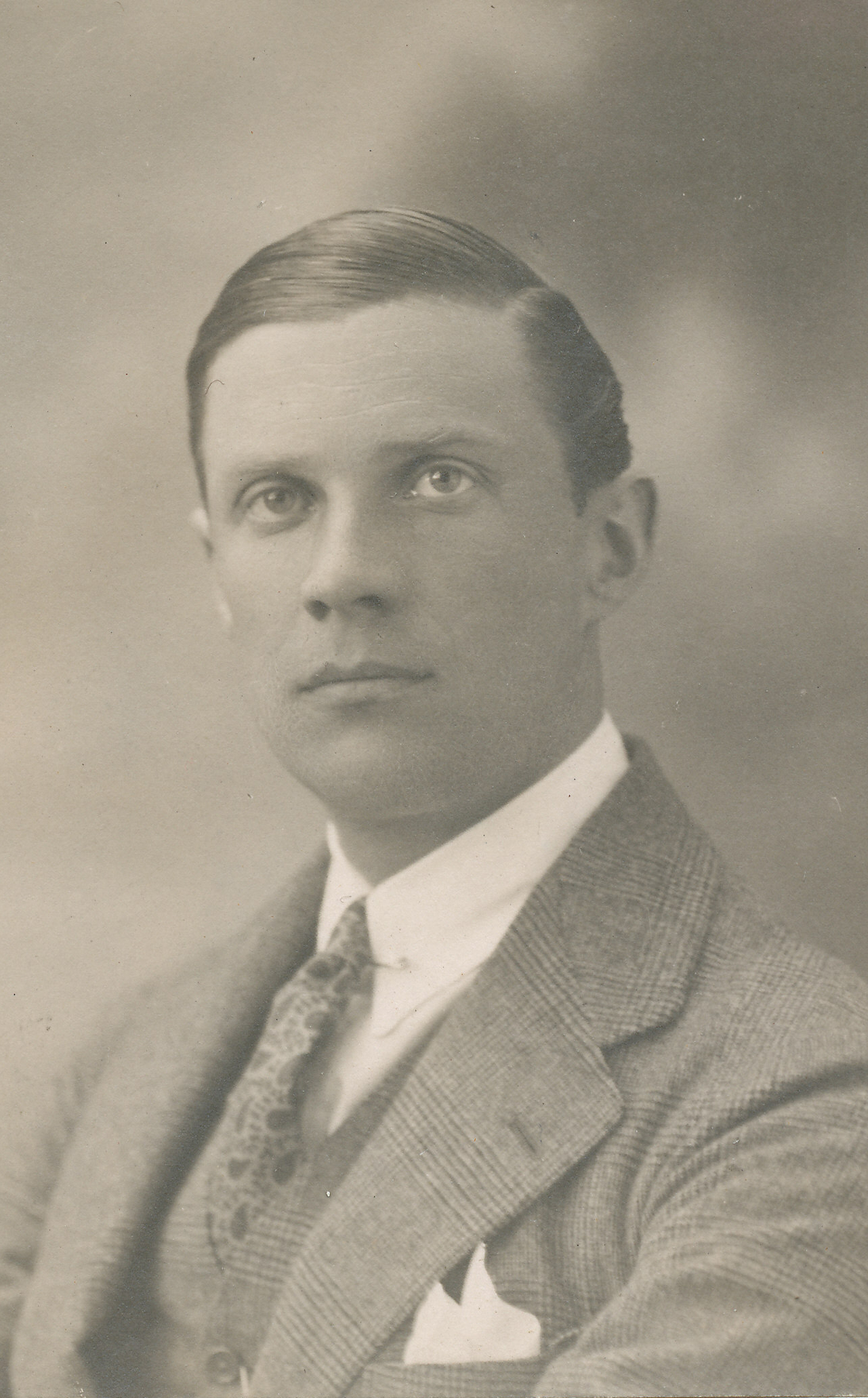 Rolf Stranger (1891–1990), disponent og politiker (H).